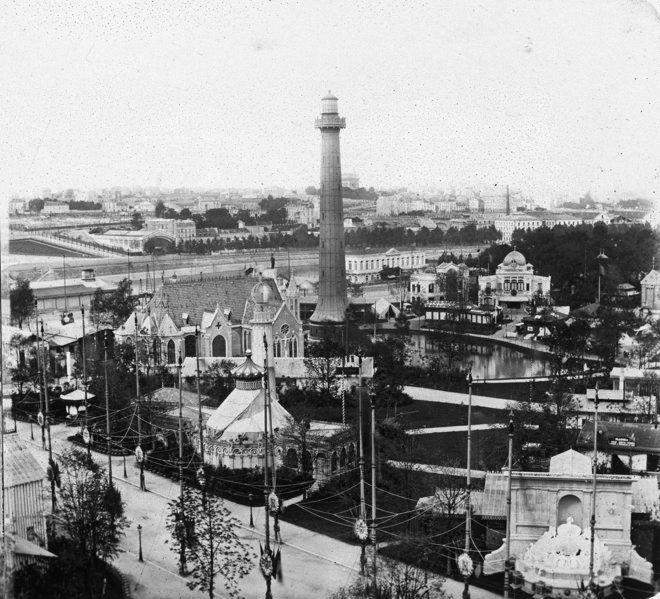 Vue générale de l'exposition universelle de Paris de 1867